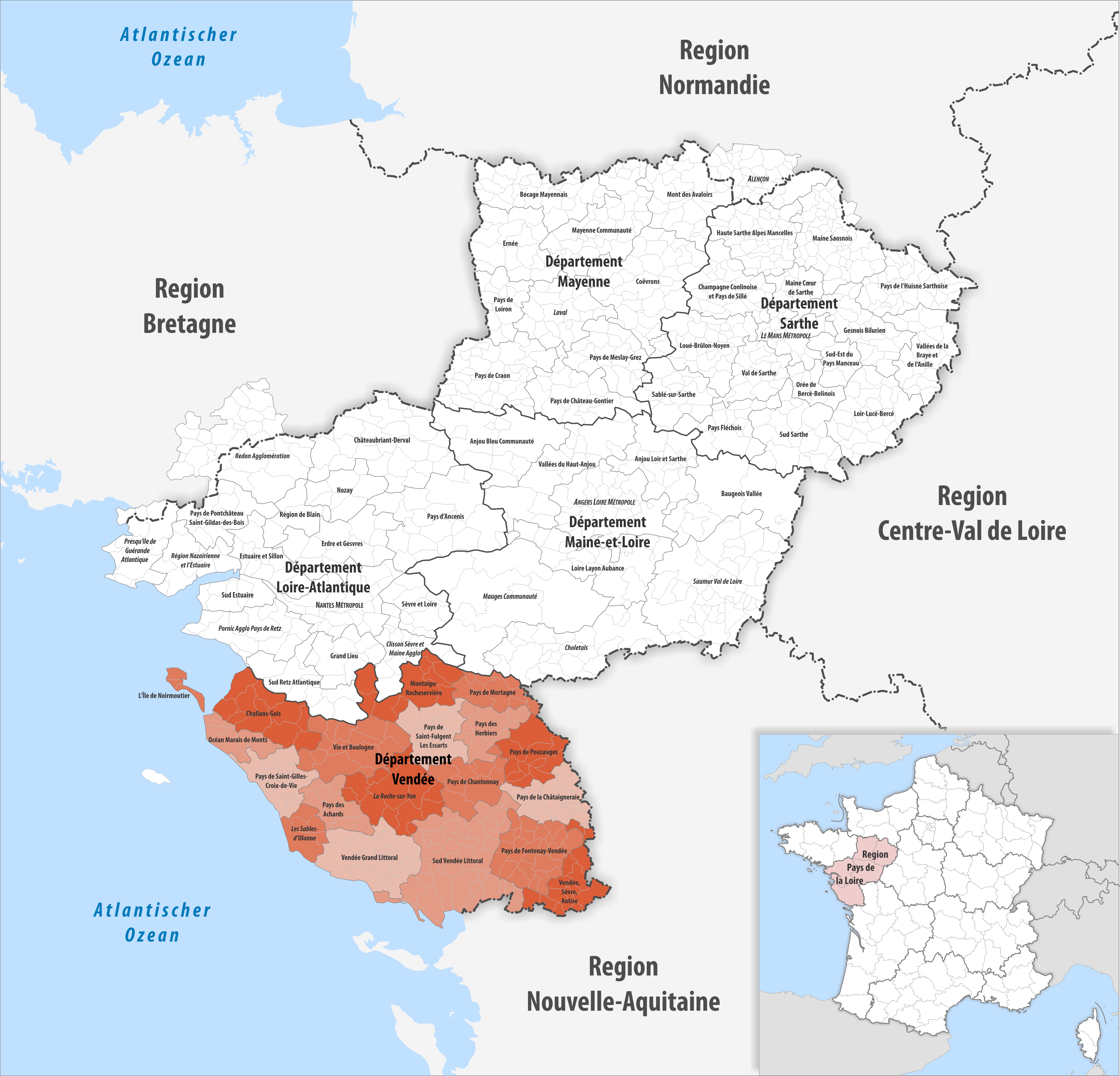 Gemeindeverbände im Département Vendée